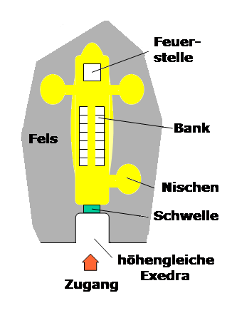 Cueva Necròpoli de Cala Sant Vicenç